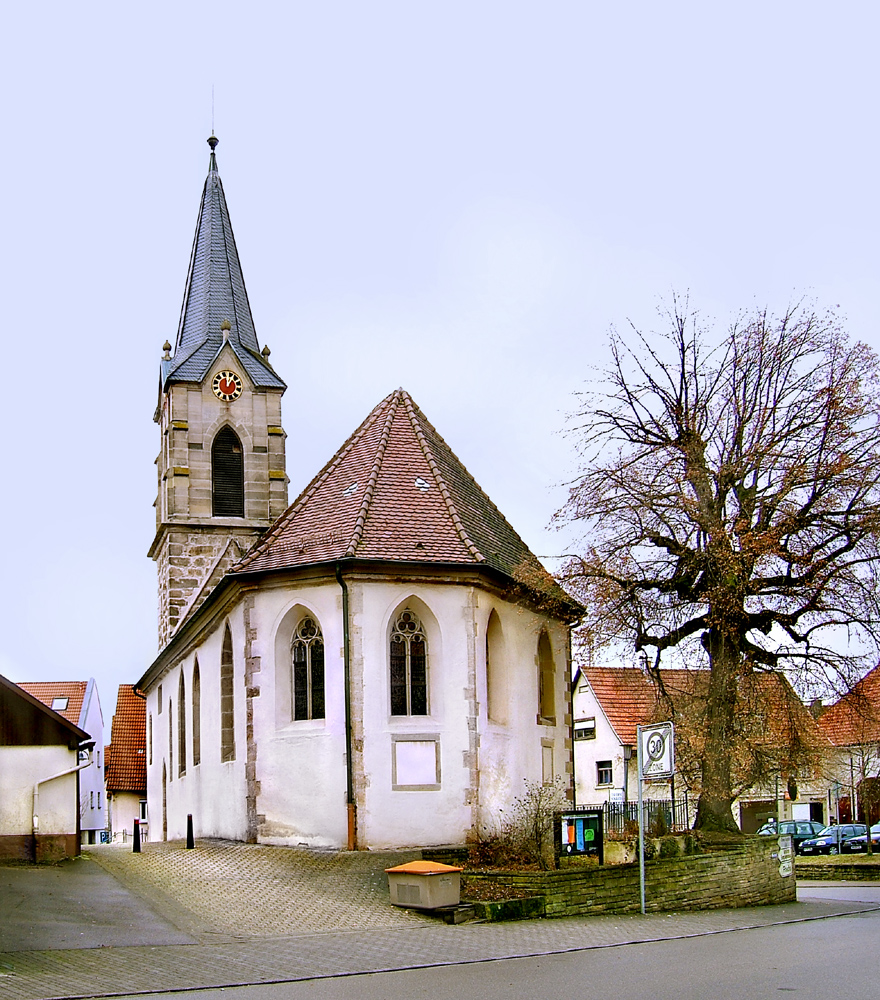 ev. Kirche in Schorndorf-Weiler, Deutschland